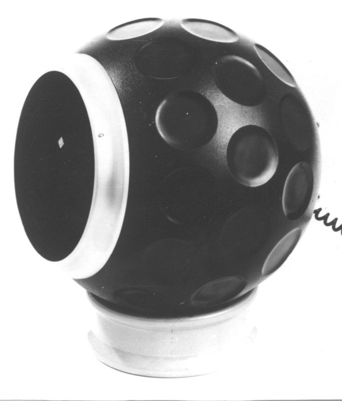 Kugelbox LK22, hergestellt bei HELIRADIO, Limbach-Oberfrohna